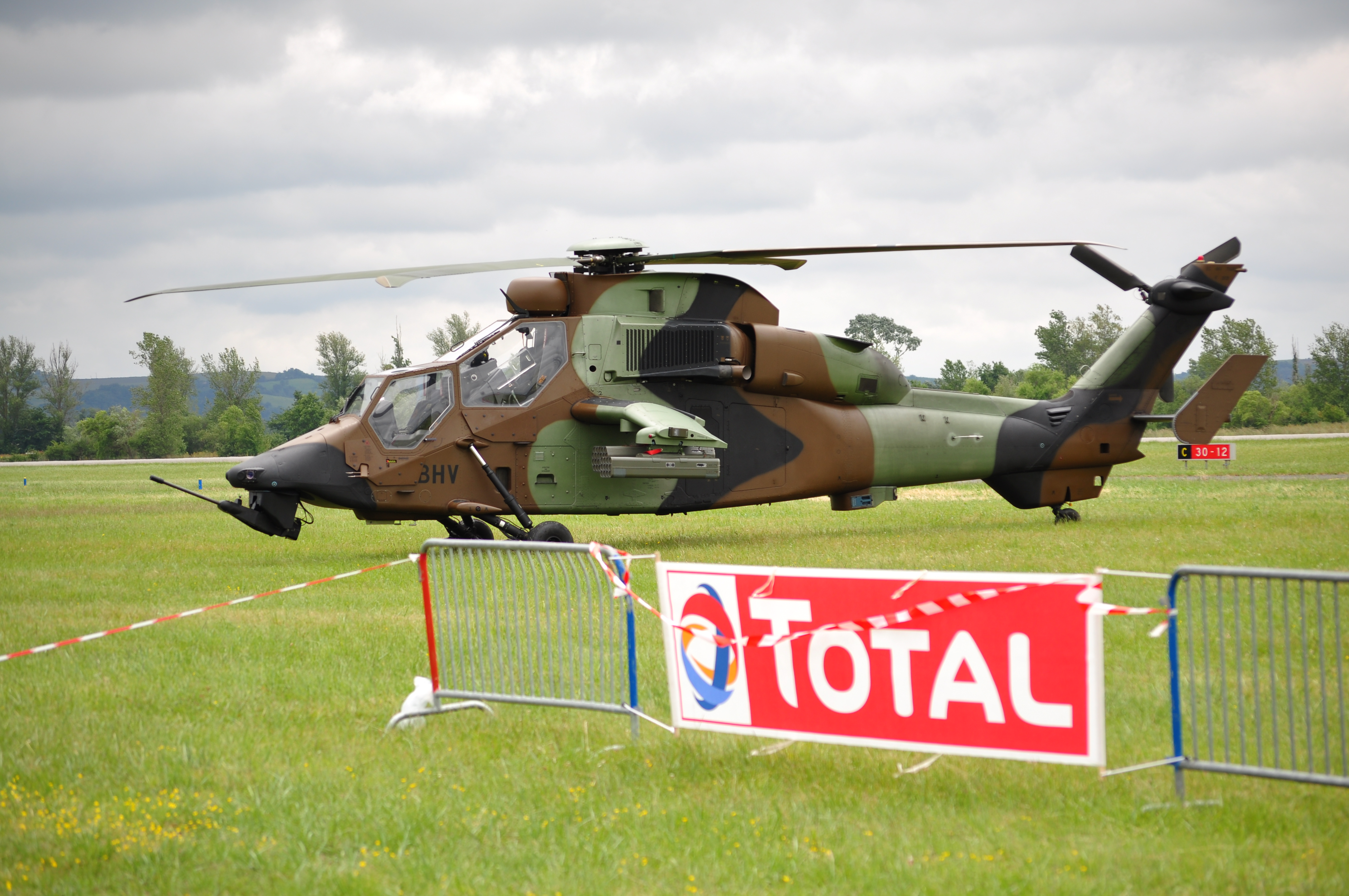 AirExpo 2014 - Tigre